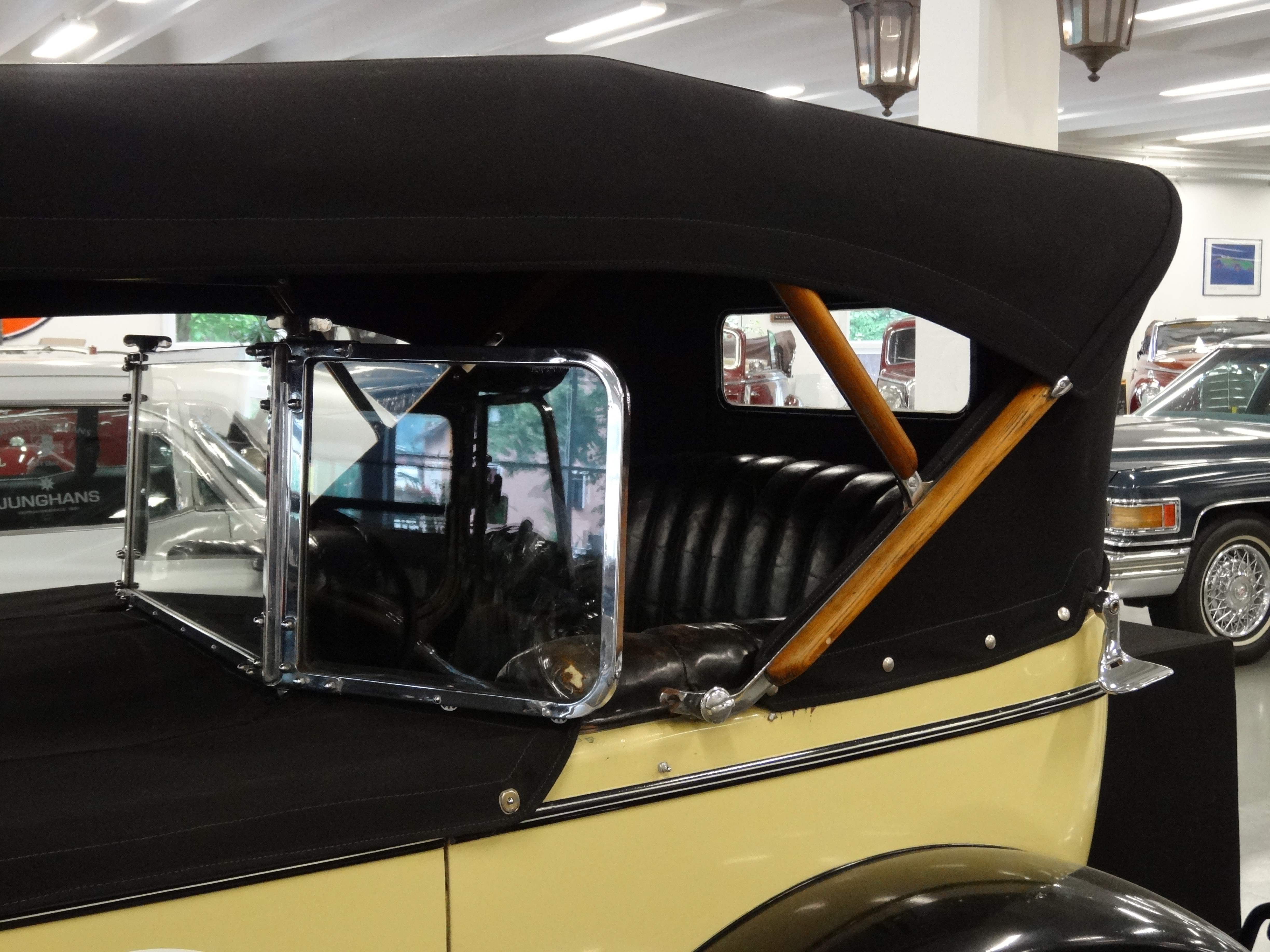 Autosammlung Steim - Schramberg 069 Duesenberg